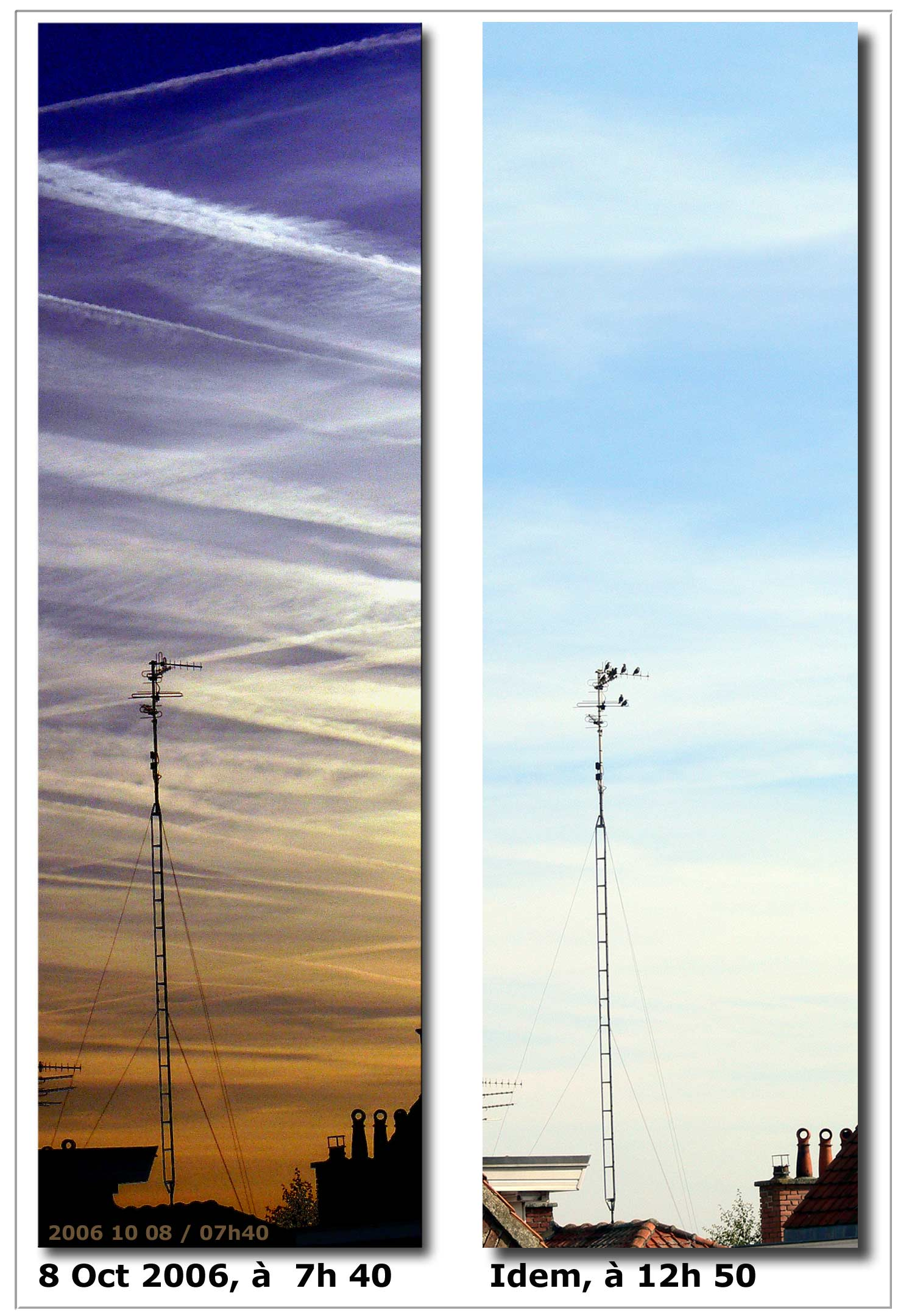 Évolution sur quelques heures de l'entrelac des trainées de condensation (contrails) laissées par les avions passés dans les heures et minutes précédent le lever du soleil vers un ciel blanchi (qui persistera toute la journée). (Rem : après nuit de pleine lune, froide et claire). Photo prise à lille (Nord de la France), côté soleil levant, le Dimanche 08 octobre par F Lamiot, et mise à disposition par l'auteur (F Lamiot) sous licence partagée CC BY SA